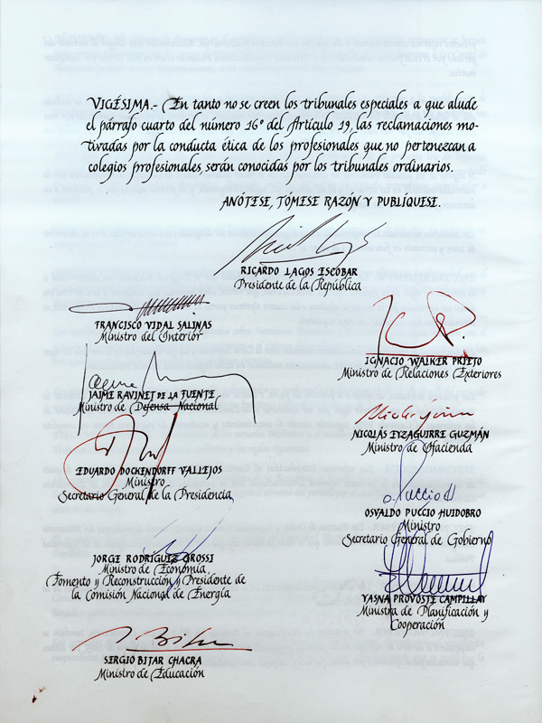 Firmas en el texto refundido, coordinado y sistematizado de la Constitución de 1980, tras la reforma de 2005. Archivo Nacional Histórico.